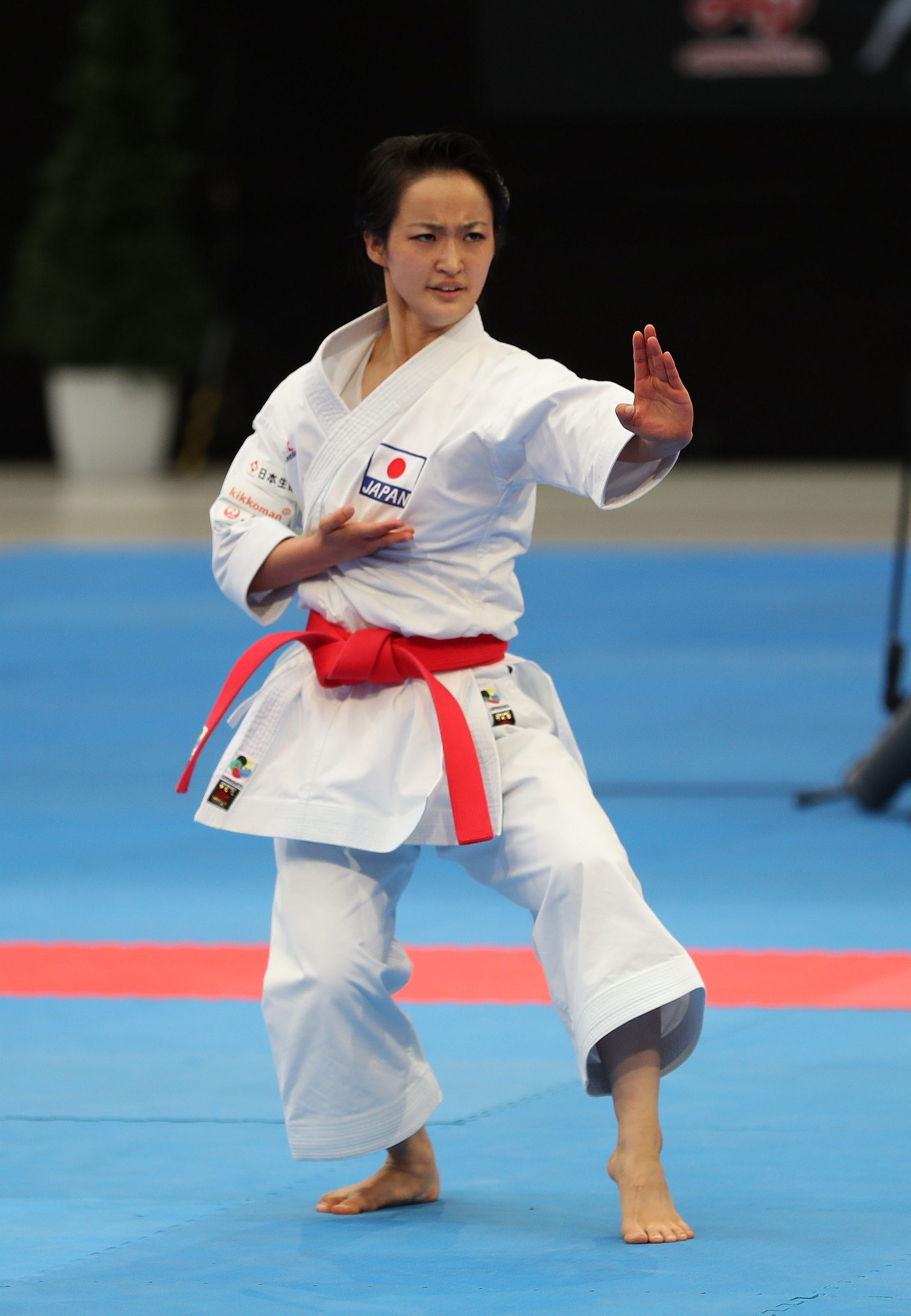 Female Kata am 16. September 2018 in der Karate1 Premier League Berlin 2018. Abgebildet: Kiyou Shimizu.